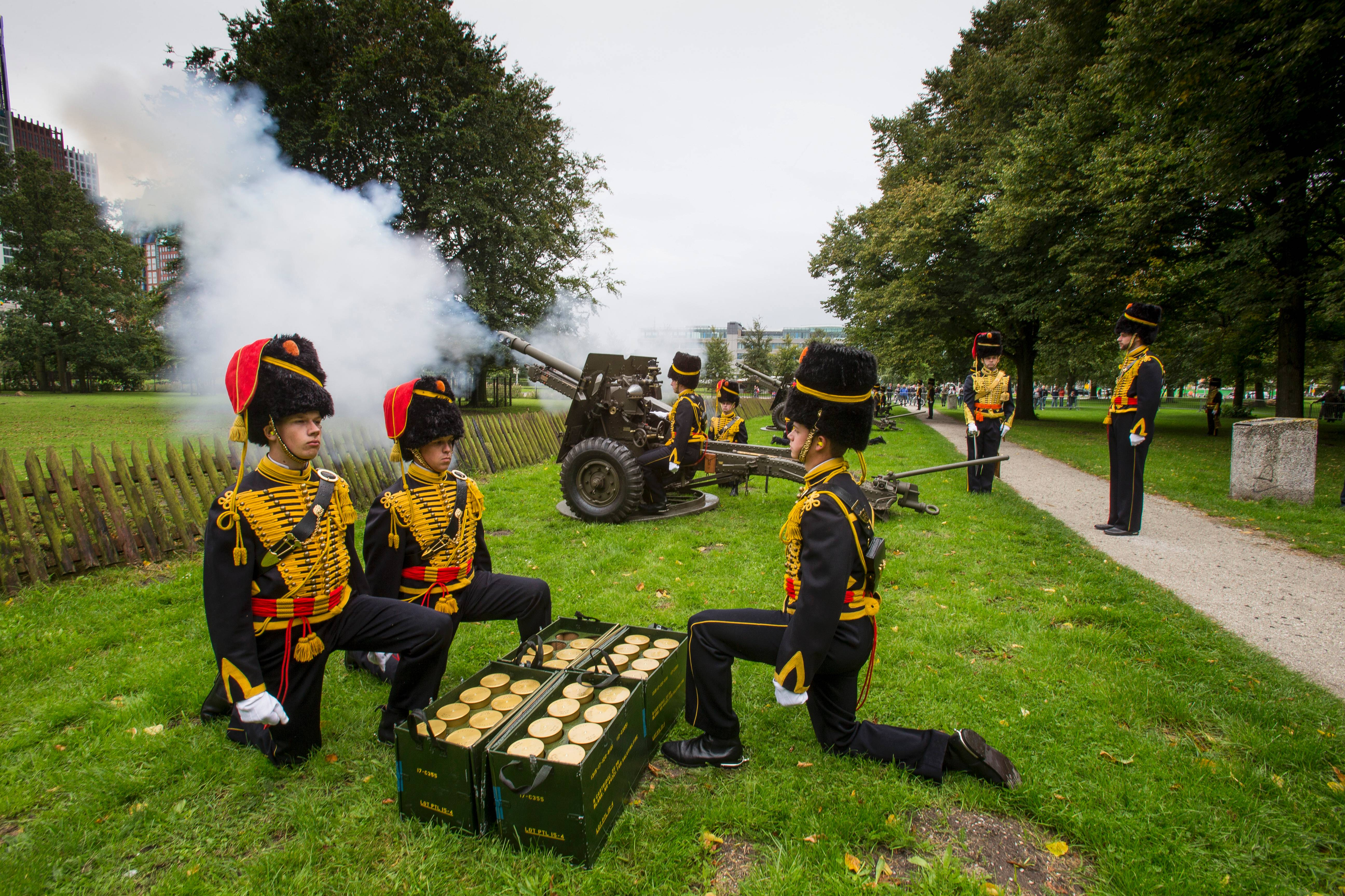 Militairen van de Gele Rijders vuren elke minuut een saluutschot af op het Malieveld ter gelegenheid van Prinsjesdag 2015.